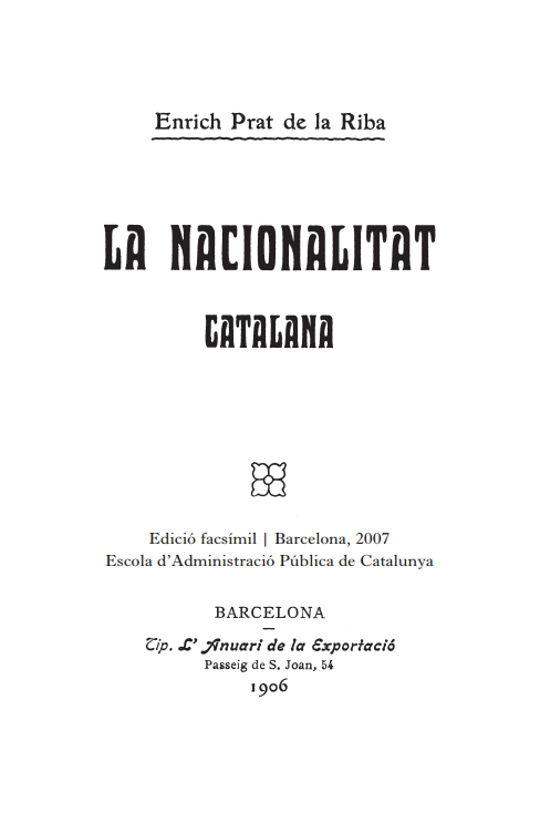 Edició facsímil. La nacionalitat catalana. Enrich Prat de la Riba. Barcelona. Tip L'Anuari de la Exportació. Passeig de S. Joan, 54. 1906.